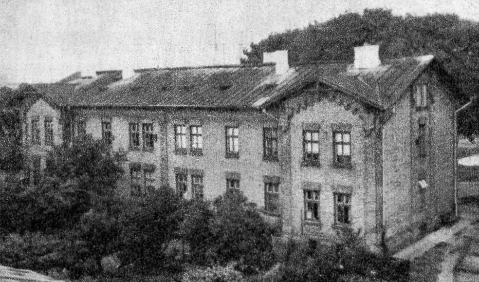 Osada robotnicza Cukrowni Ciechanów w 1983r.